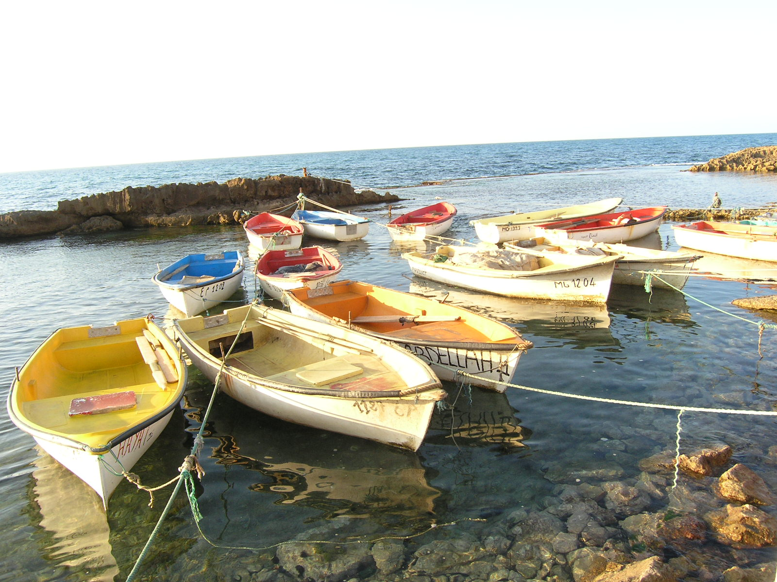 Pêcherie stidia Mostaganem